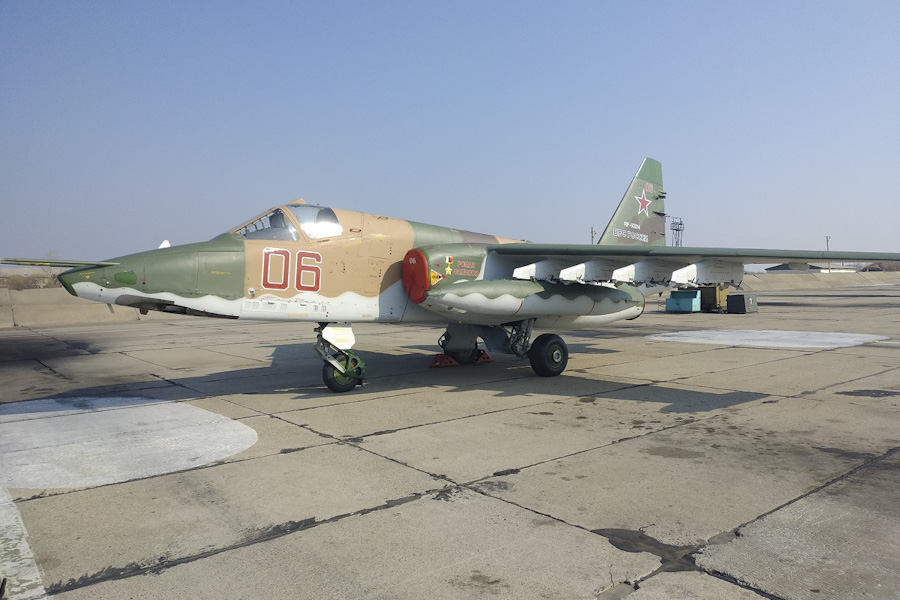 Церемония присвоения имени Героя России майора Романа Филипова самолёту Су-25СМ на аэродроме штурмового авиационного полка армии ВВС и ПВО Восточного военного округа, дислоцированного в Приморском крае.